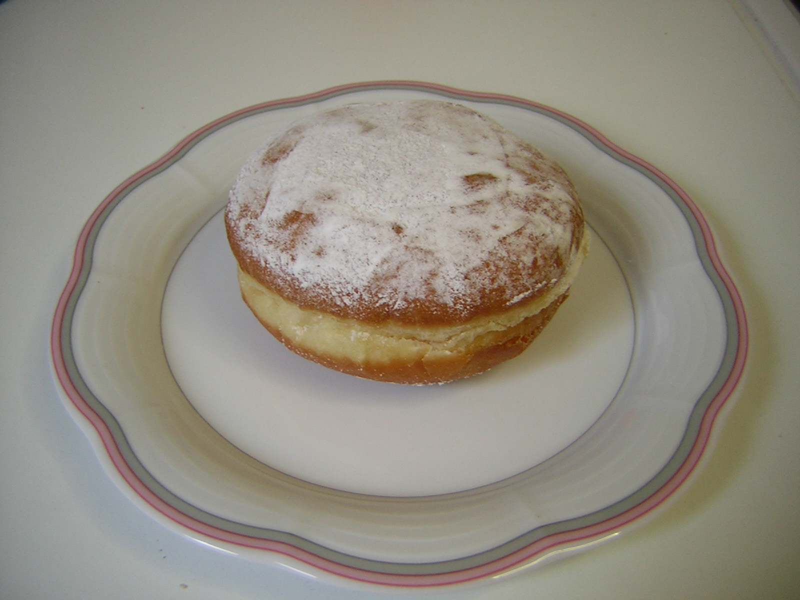 The picture shows an austrian "Krapfen" (Fried dough food). Das Bild zeigt einen Krapfen (Österreichische Süßspeise)